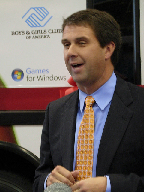 Robbie Bach